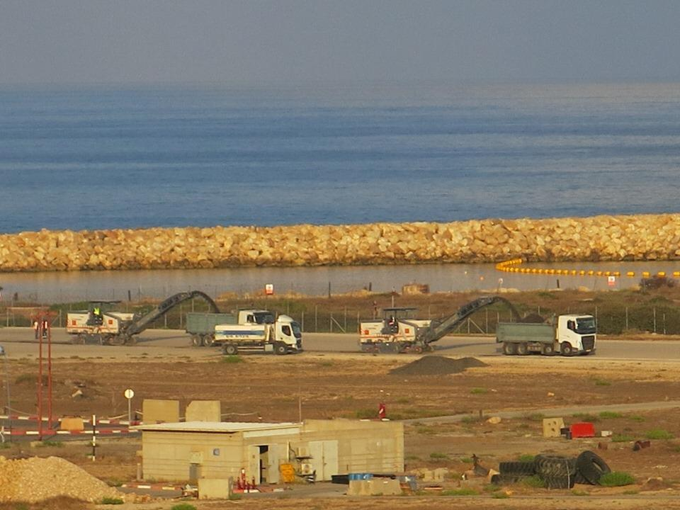 עבודות להריסת מסלול הטיסה